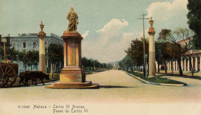 Paseo Carlos III. La Habana. Cuba.Finales del siglo XIX